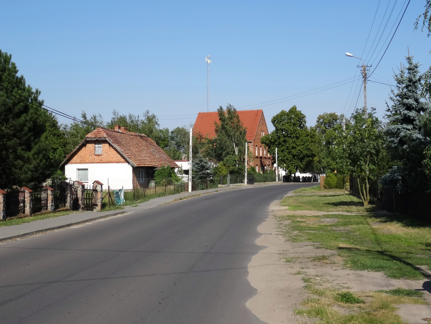 Czarże, gmina Dąbrowa Chełmińska